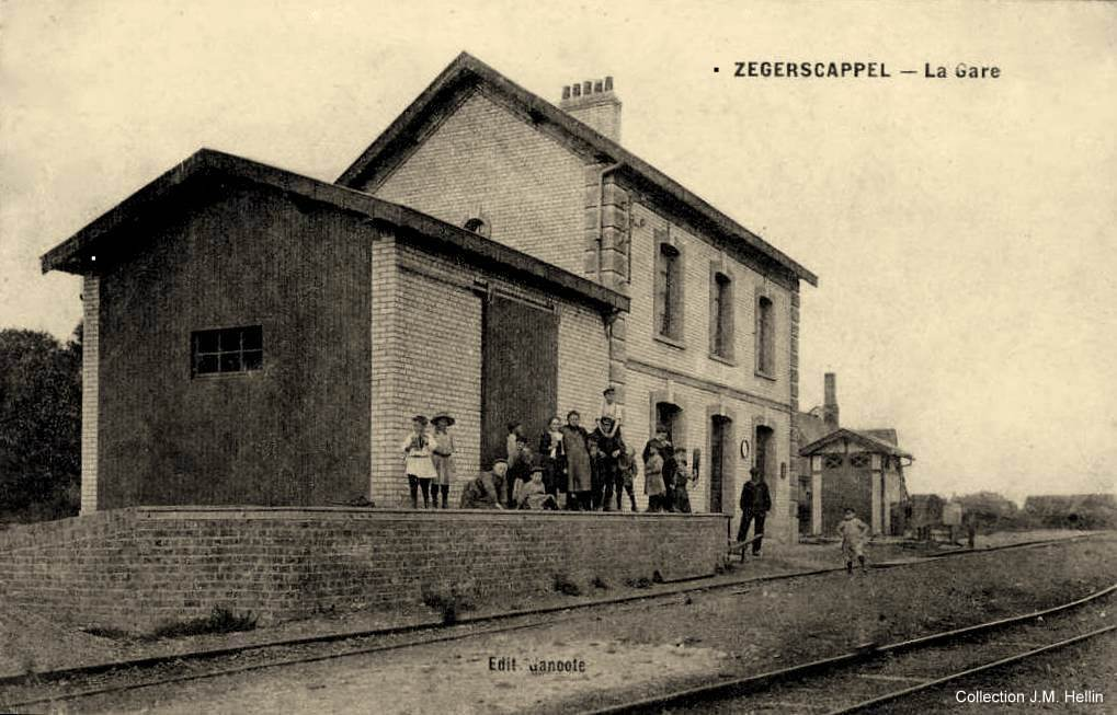 Carte postale Titre : ZEGERSCAPPEL - La Gare